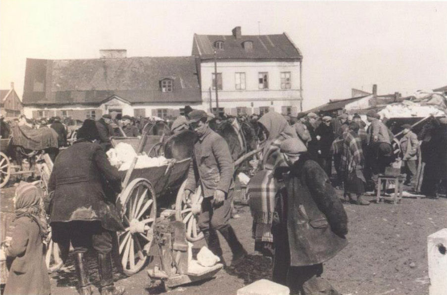 Беларуская (тарашкевіца): Петрыкаў (Pietrykaŭ), пляц Рынак (plac Rynak)